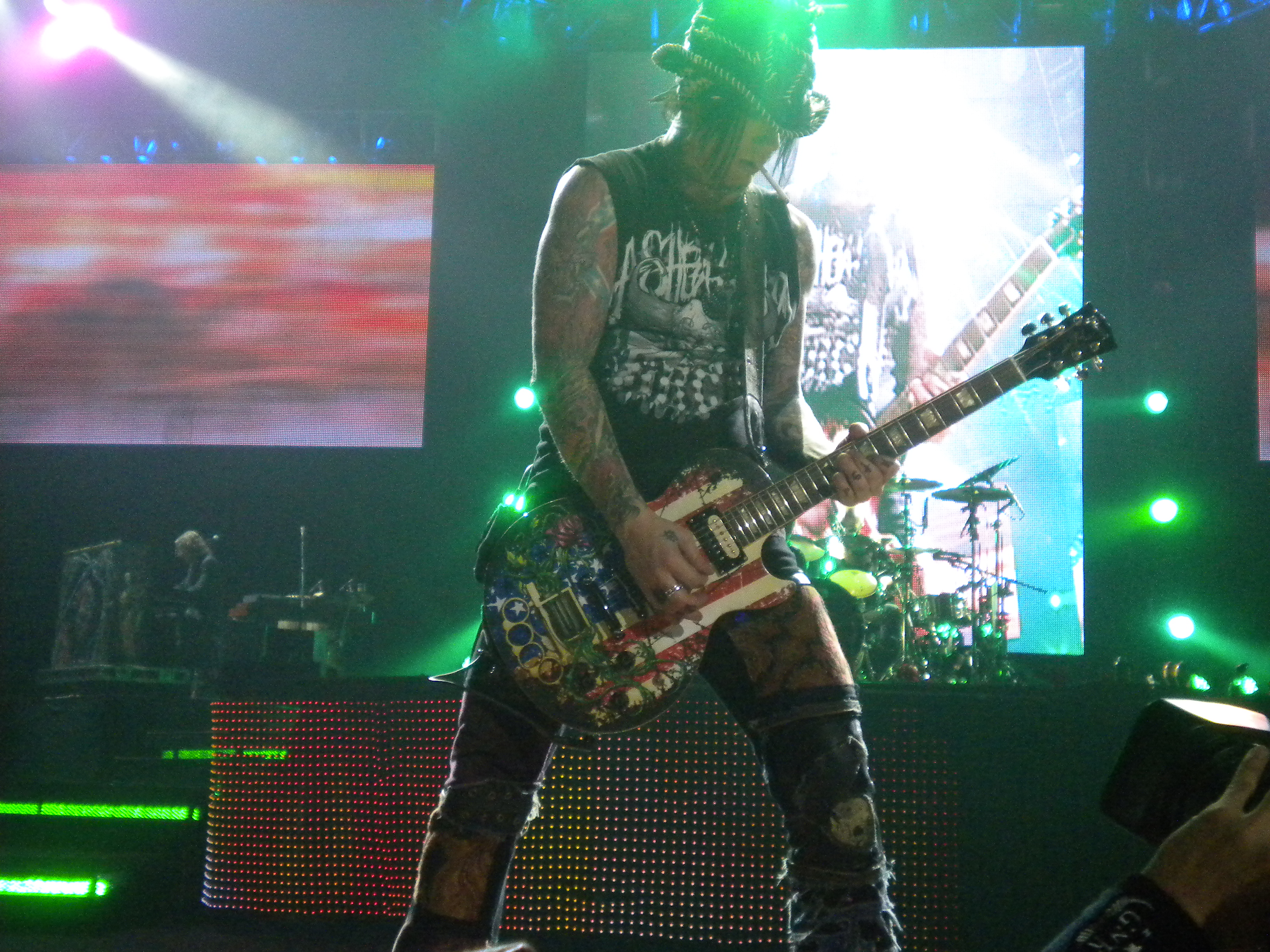 concierto en phoenix,arizona